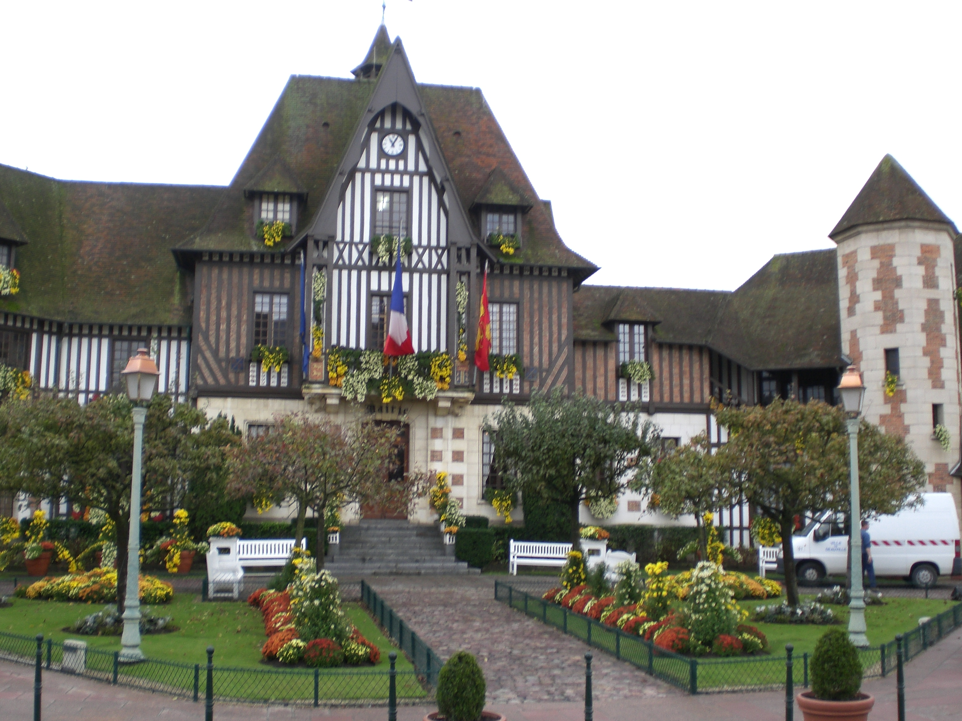 Mairie de Deauville, France